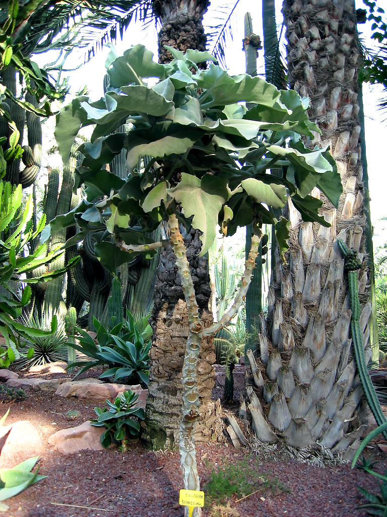 Kalanchoe beharensis en el Huerto del Cura